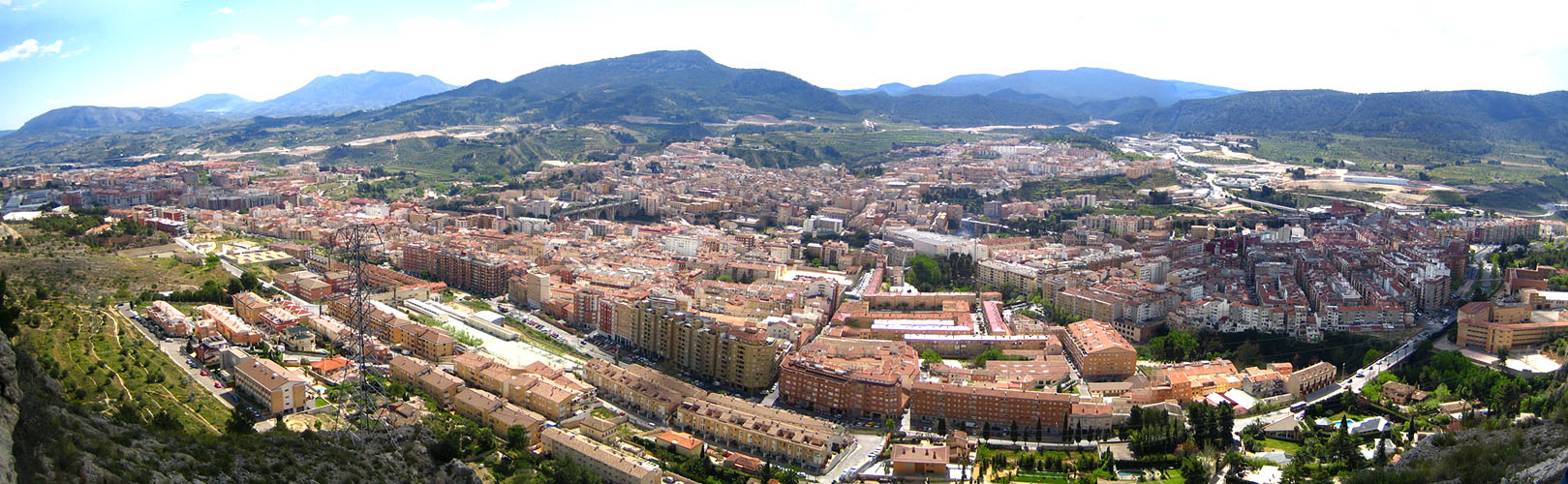 Foto panoràmica d'Alcoi, des de la Mariola